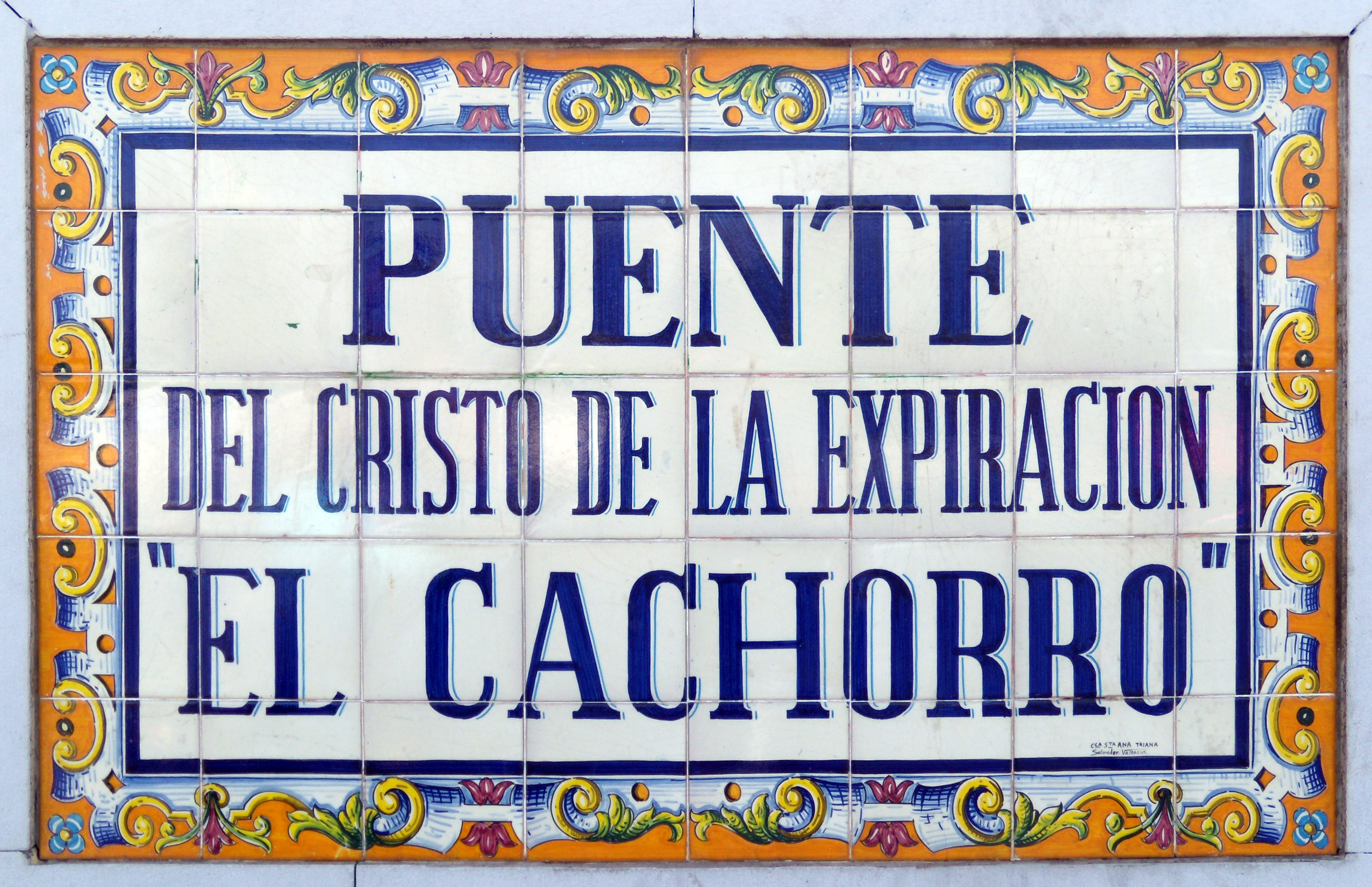 Inscriptions sur céramique à l'extrémité ouest du Pont du Christ de l'Expiration (Séville, Espagne)